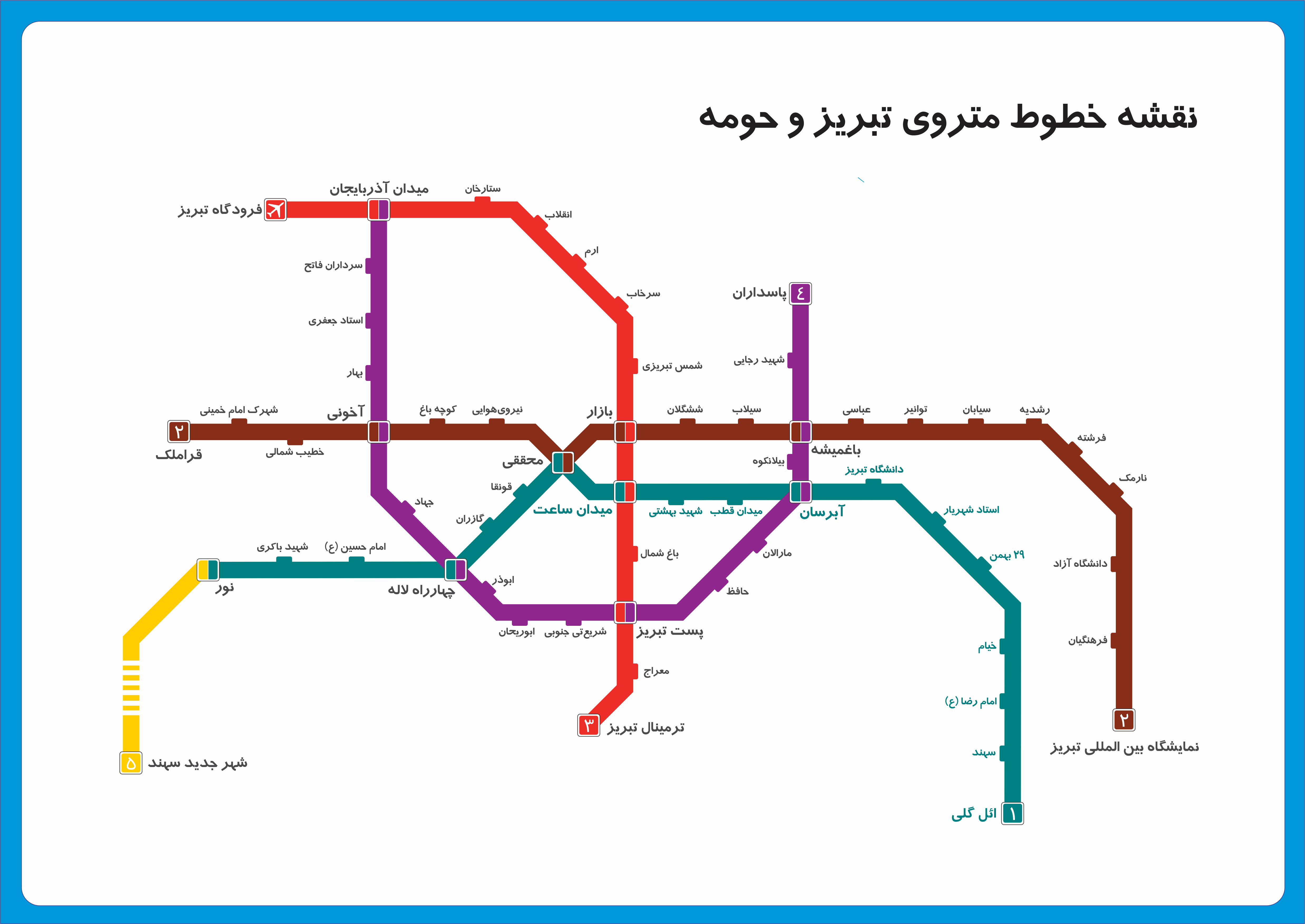 نقشه کامل متروی تبریز ۱۳۹۴. ایستگاه های همرنگِ خط، در حال بهره برداری هستند.